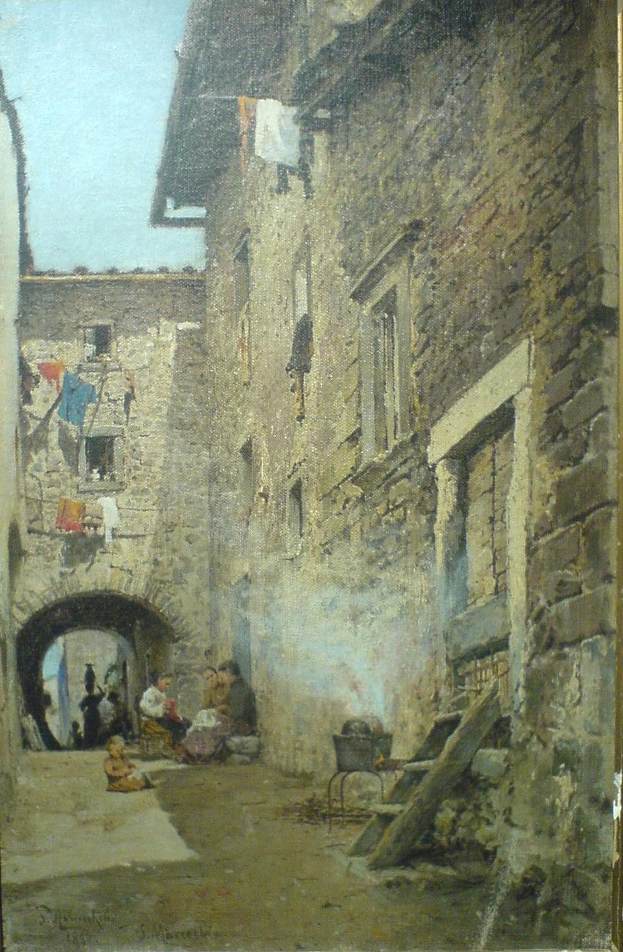 View of Mazzolada di Lison, Veneto, Italy